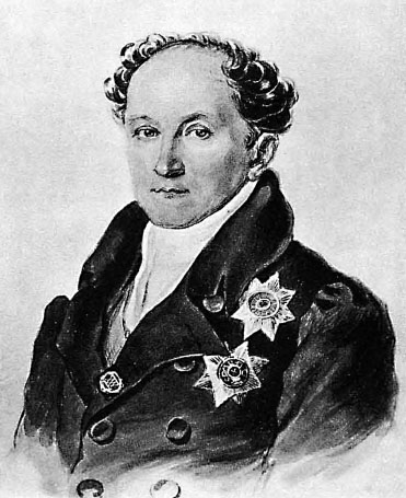 Князь Александр Николаевич Голицын (1773-1844)